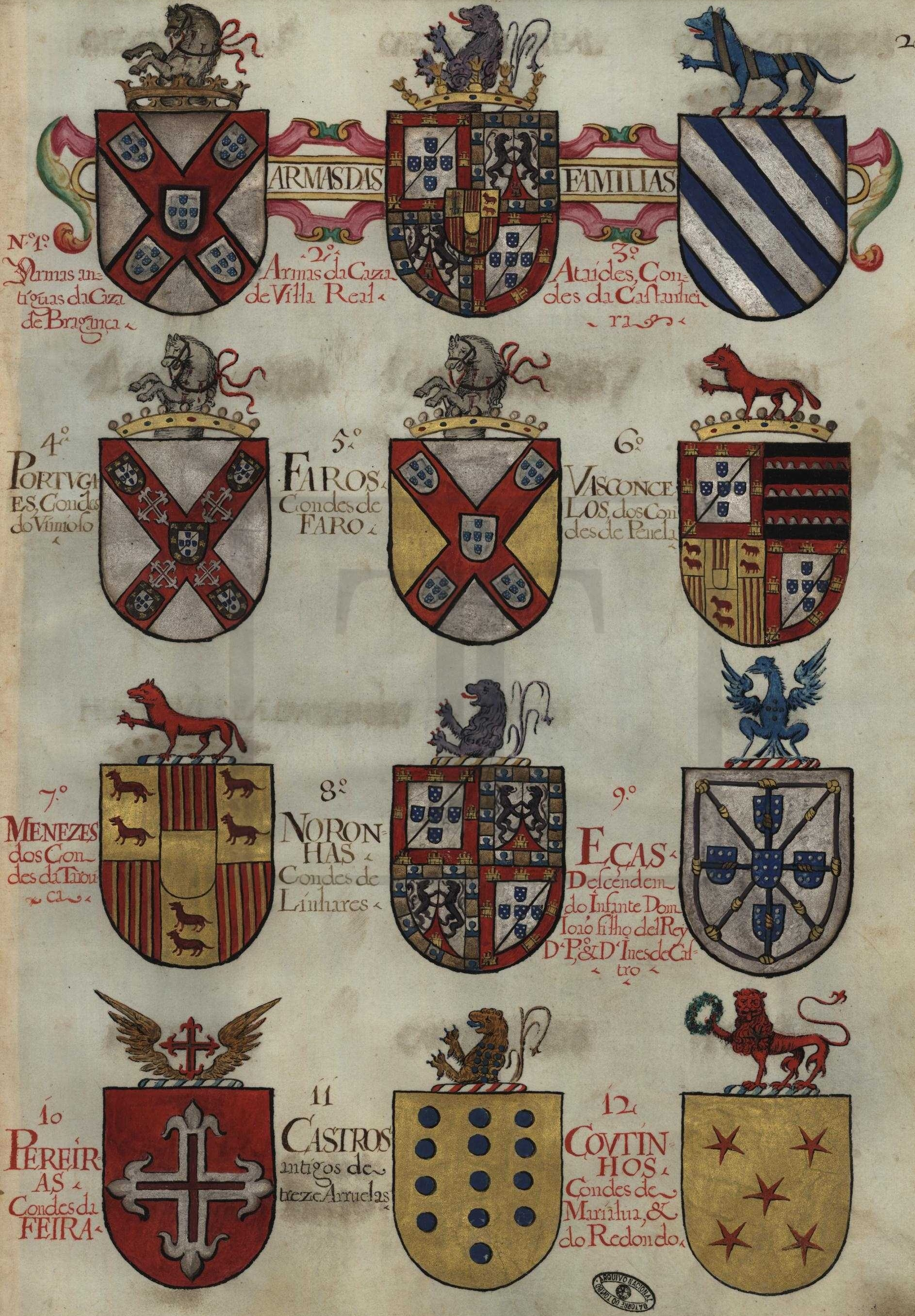 Thesouro de Nobreza, Armas das Famílias 1/40 (fl 27)